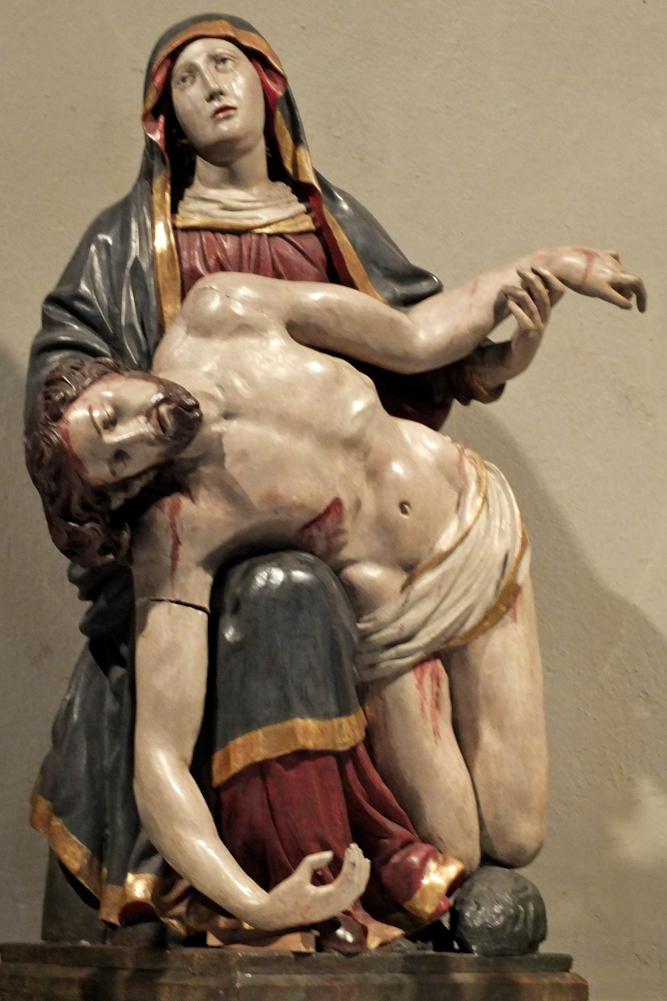 Pietà in der St. Jacobus Kirche, Hilden